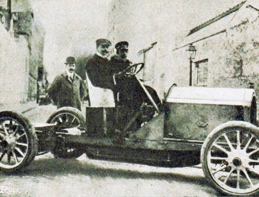 Marc Sorel sur De Dietrich, à la Coupe des Pyrénées 1905 (vainqueur) - La Vie au Grand Air du 2 février 1906, p.98